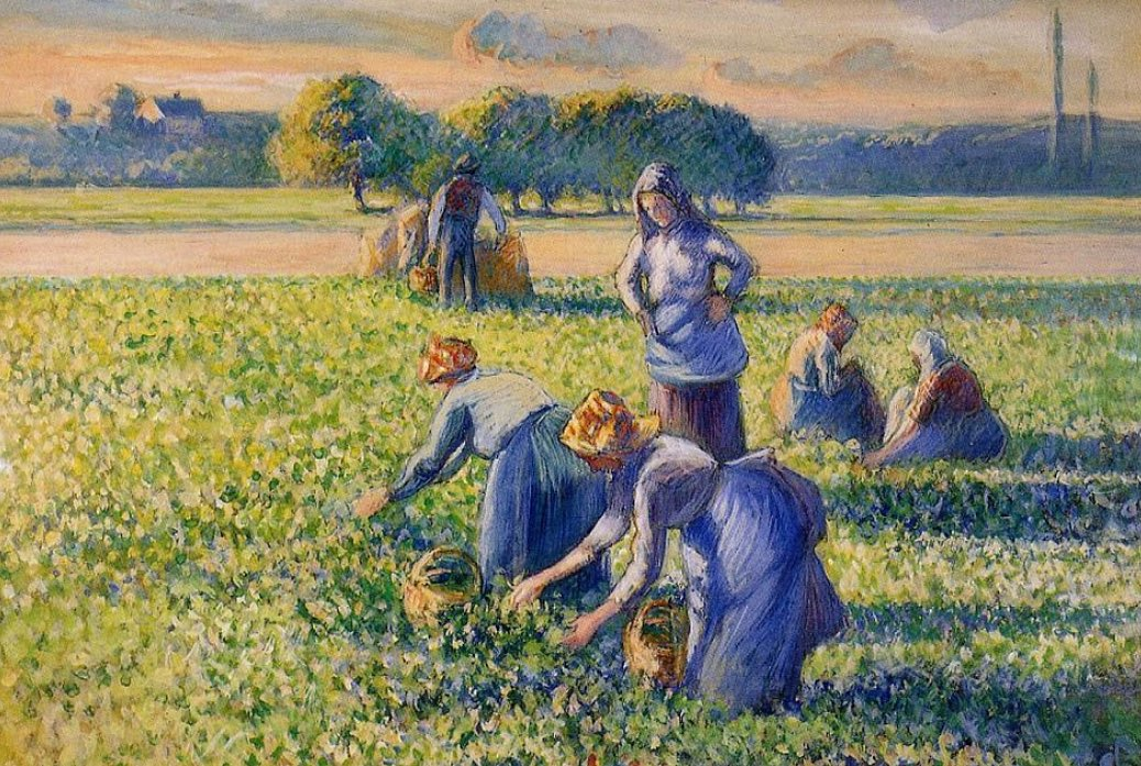 La cueillette des pois. Tableau de Camille Pissarro de la collection Simon Bauer spoliée durant la Seconde guerre mondiale.